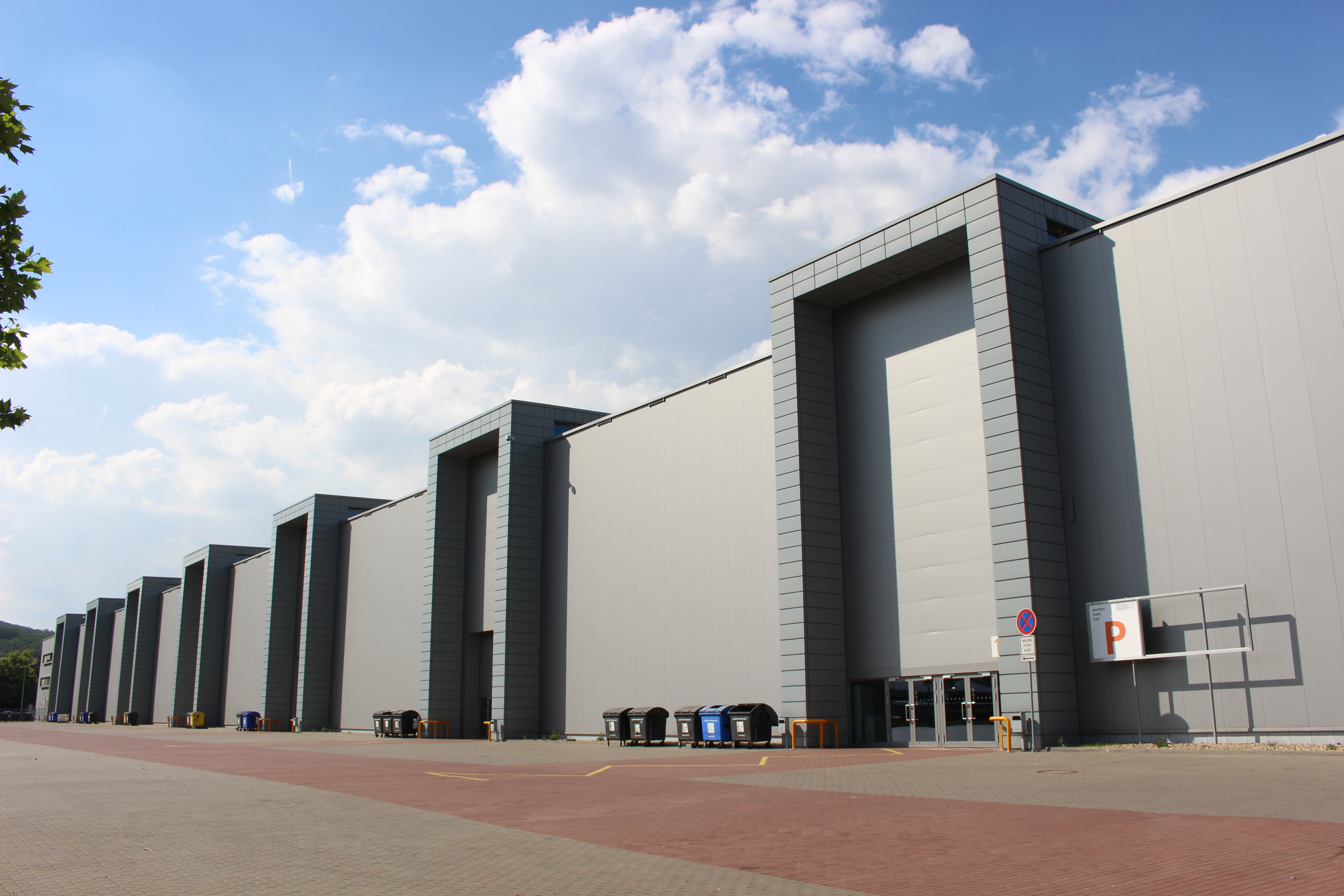 Pavilon P, Brněnské výstaviště